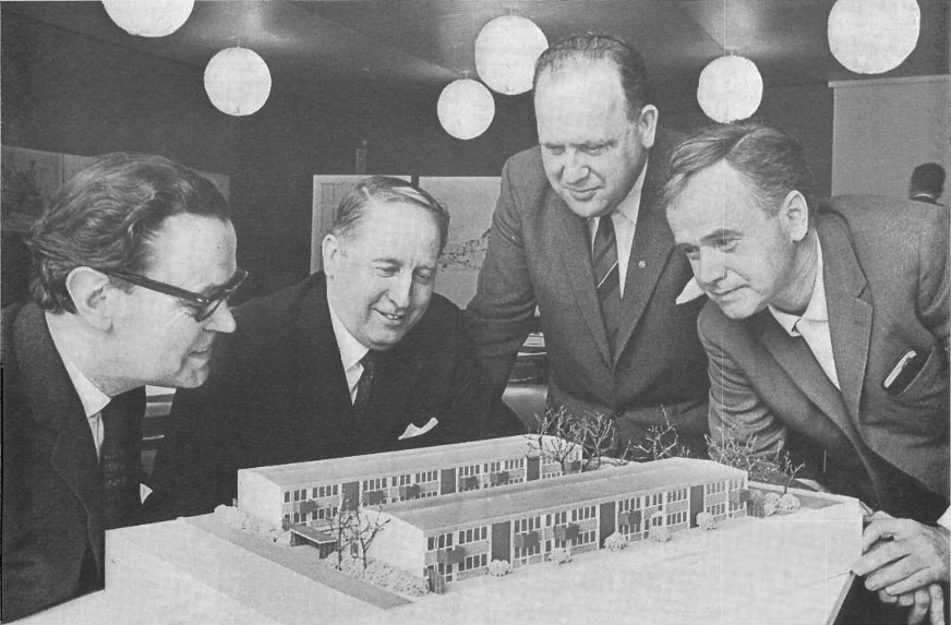 Segrare i arkitekttävling. Från vänster professor Lennart Kvarnström, direktör Joel Danielsson, direktör Harald Aronsson, professor Bertil Hultén.